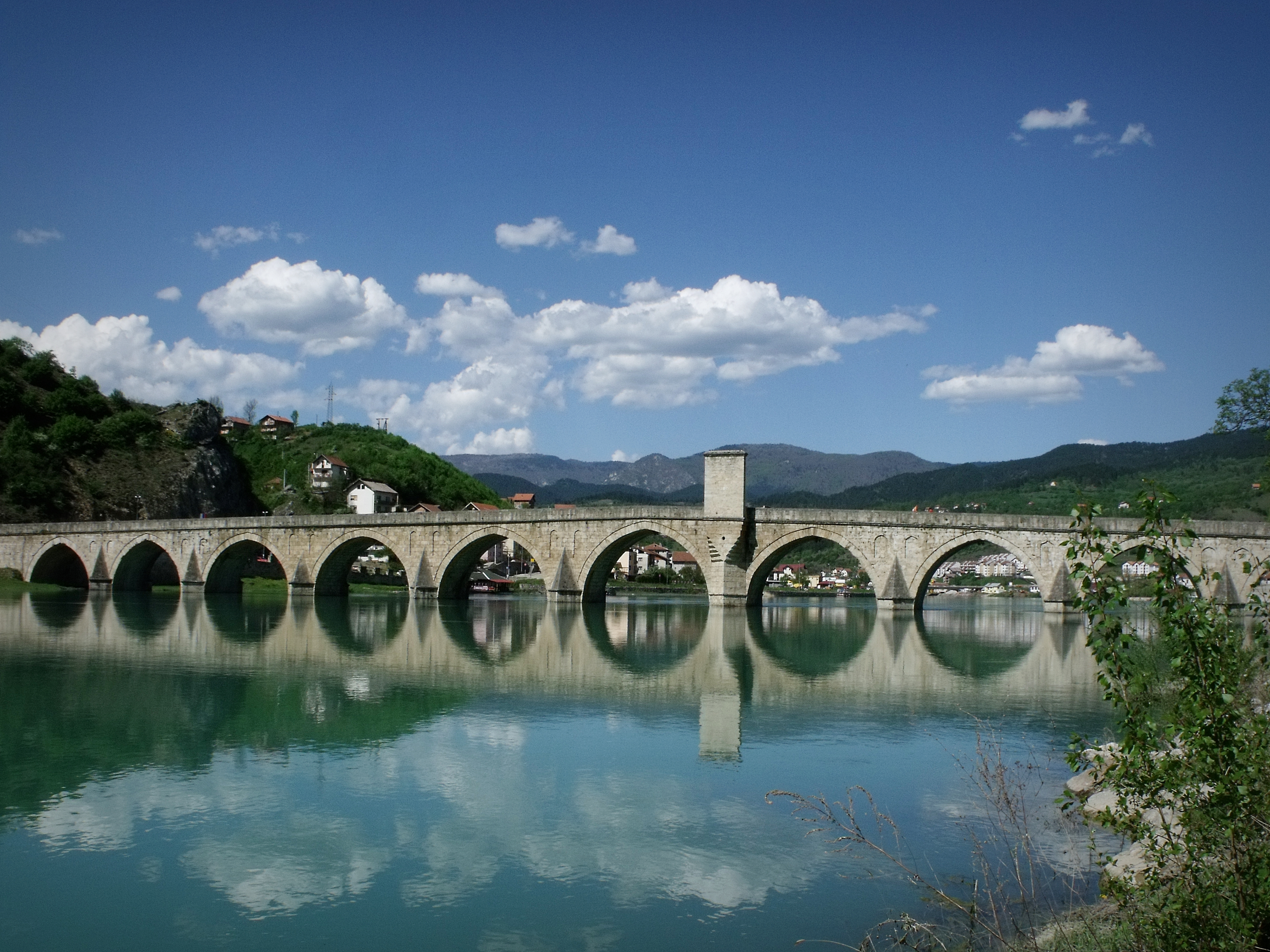 Ćurpija u proljeće Сликава е подигната во рамките на проектот „По трагата на душата 2015“.